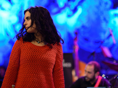 Andrea Motis, febrero de 2014, Palau de la Música Catalana, Barcelona